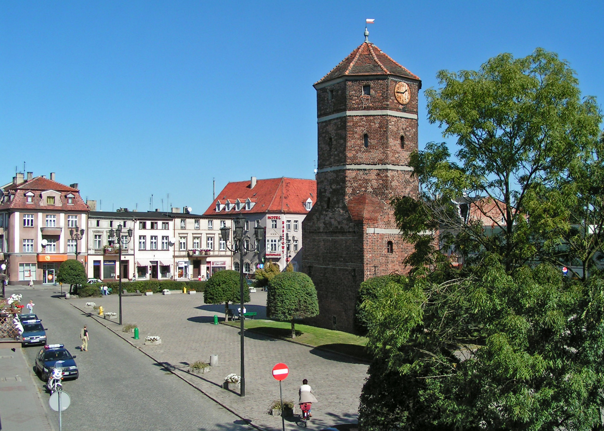 Żnin, XV-wieczna wieża ratuszowa na rynku